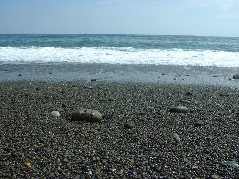 熊野灘 三輪崎海岸（和歌山県新宮市）